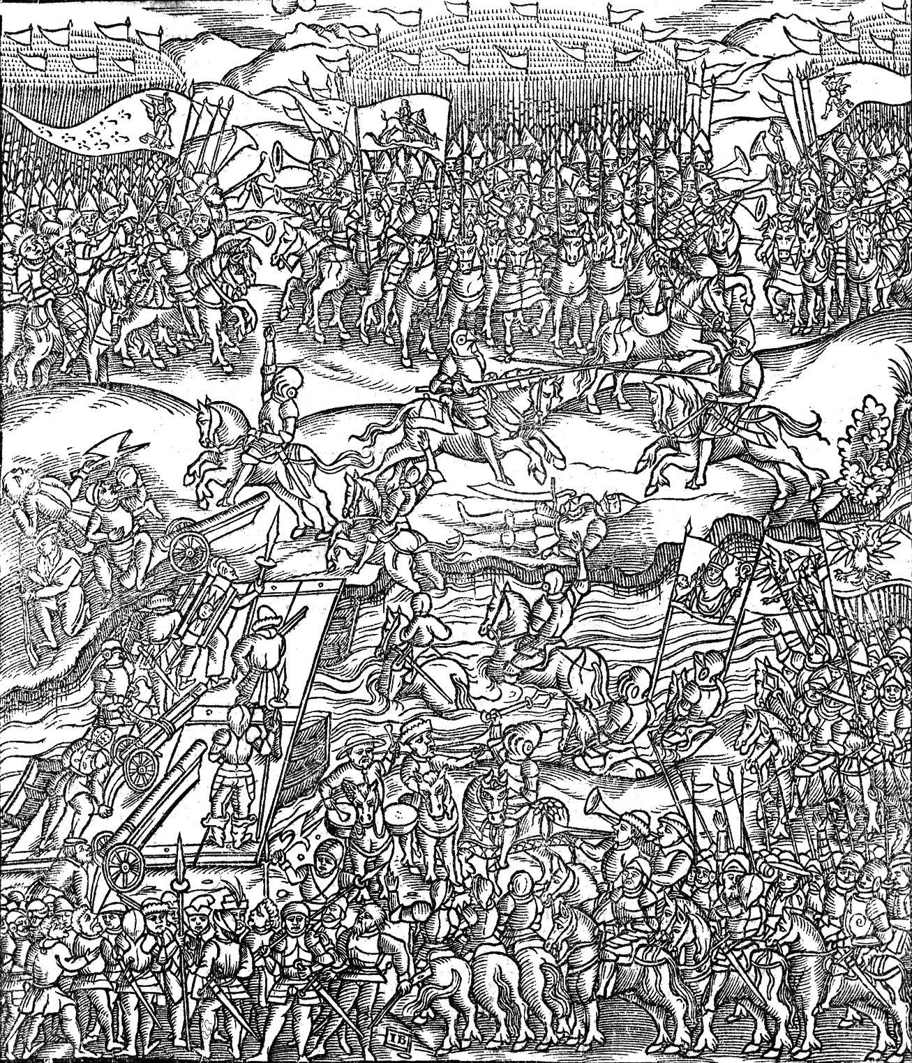 Беларуская (тарашкевіца): Аршанская бітва (Aršanskaja bitva)